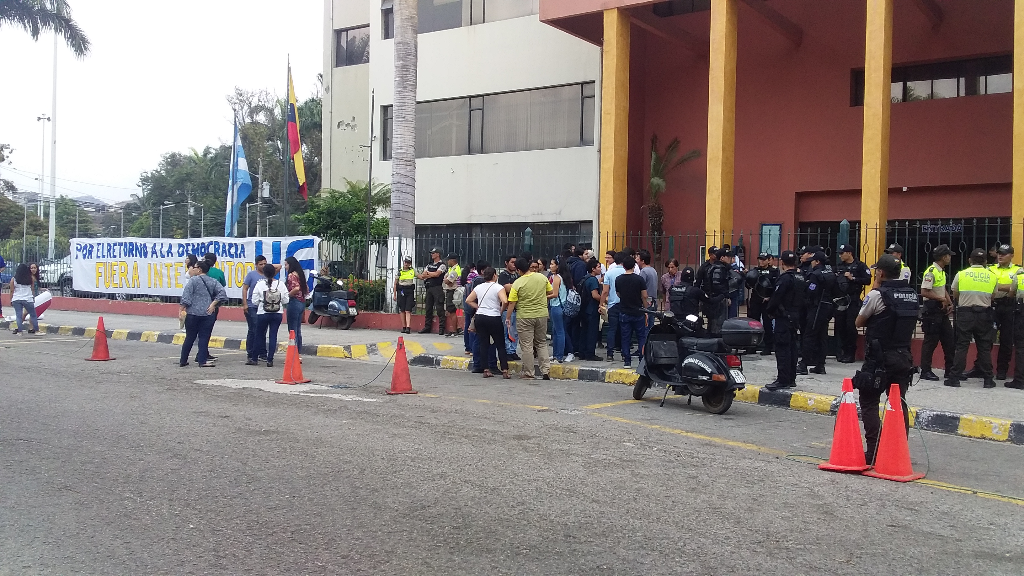 Planton contra la Administración de Roberto Passalaigue en la Universidad de Guayaquil